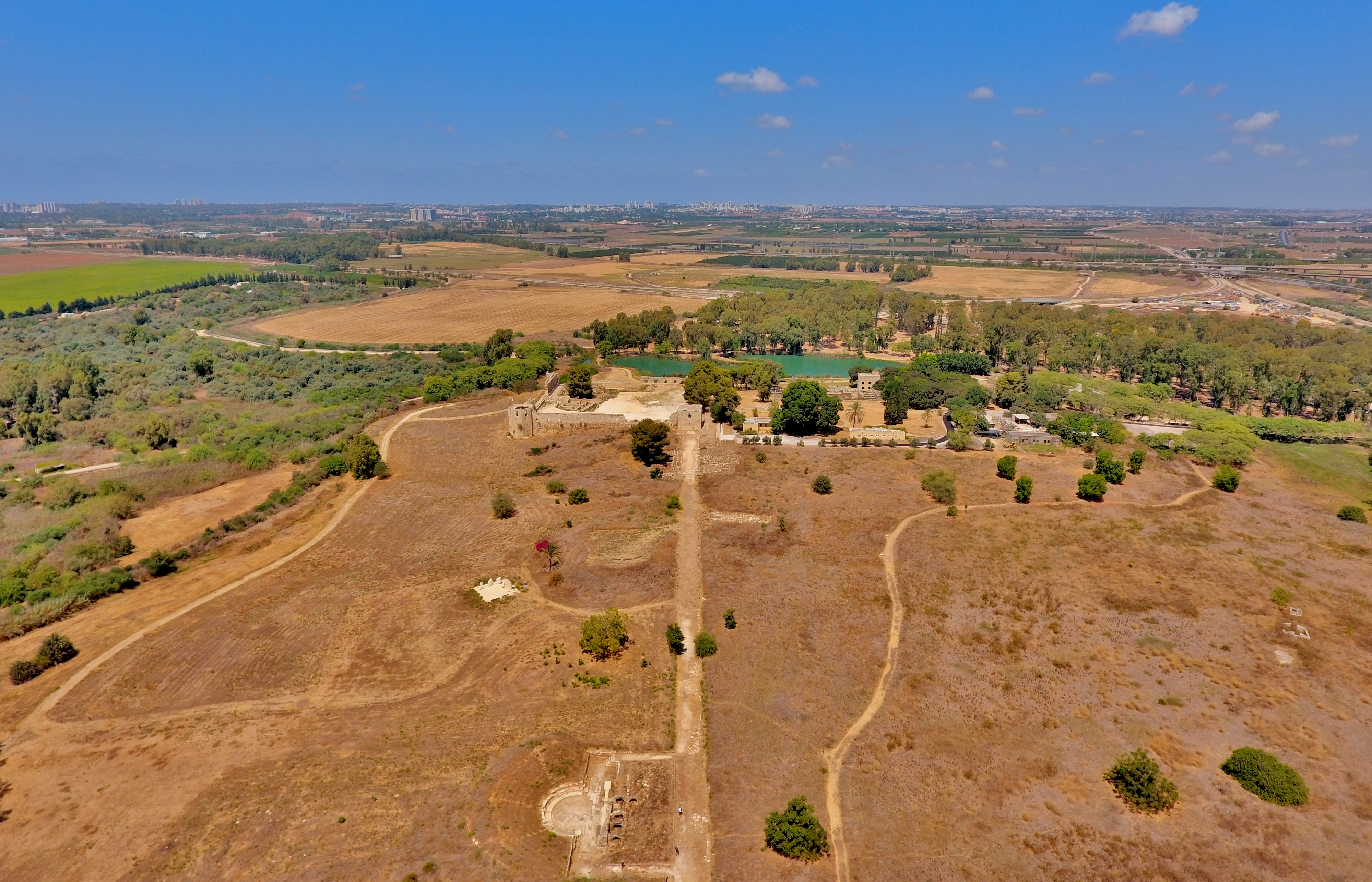 הגן הלאומי ירקון הוא גן לאומי המשלב כיום שני אתרים: האחד הוא תל אפק, שהכניסה אליו היא מכביש 483, בין פתח-תקוה לראש העין והשני, מקורות נחל הירקון שהגישה אליו היא מכביש 5 או מכביש 40, דרך הכניסה אל כפר הבפטיסטים. בגן יש אתרים מעניינים לביקור לצד מרחבי דשא, עצים ומים, לנופש ולבילוי.